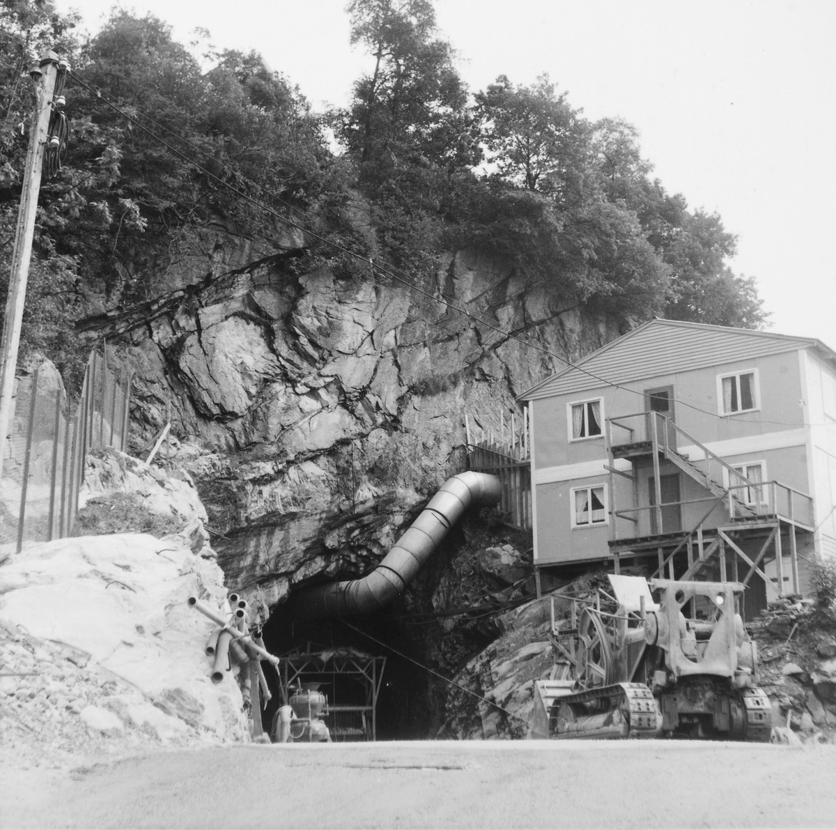 Ulrikstunnelens vestre tunnelinnslag under byggingen